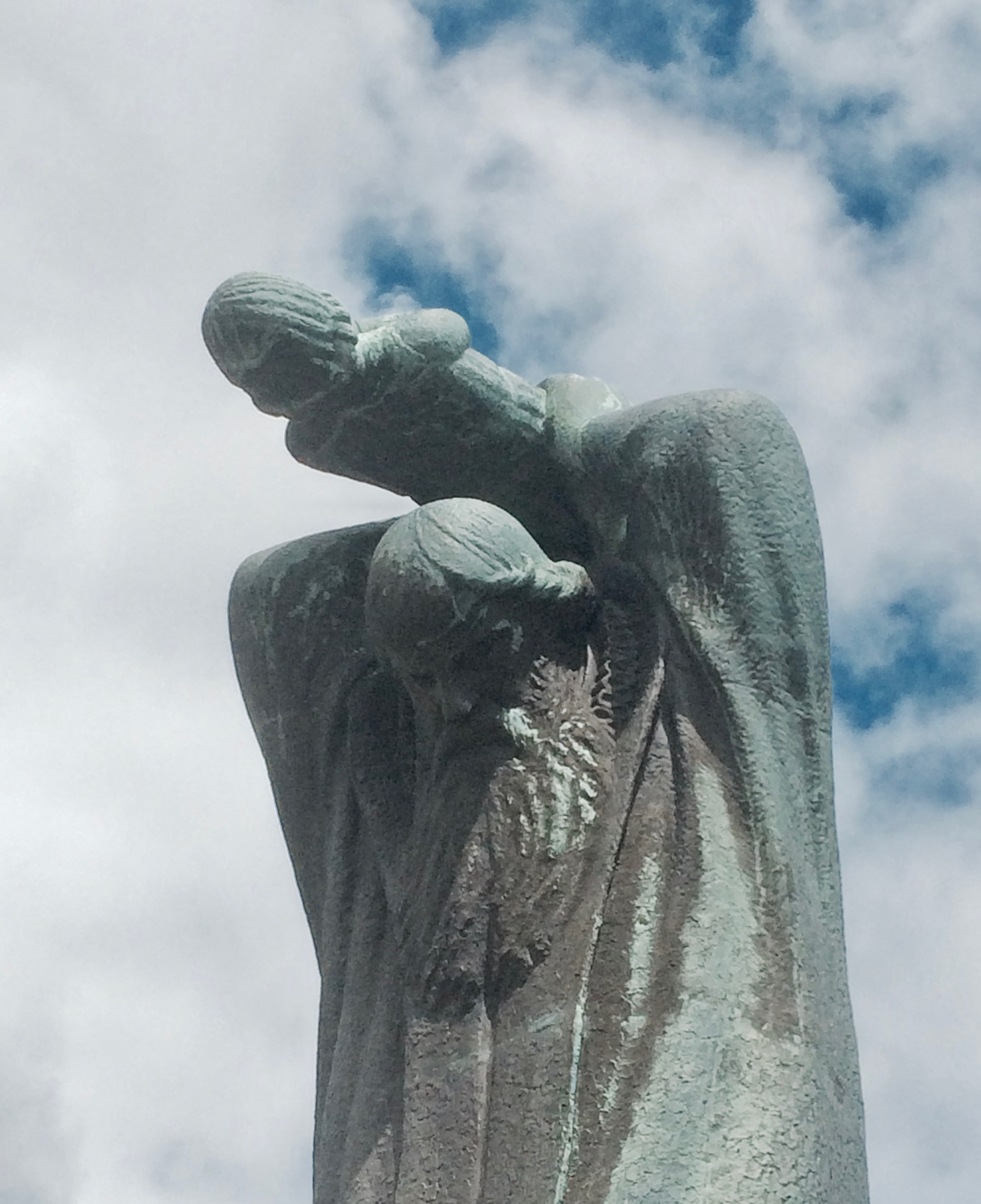 Monument over Peder Claussøn Friis. 1938. Skulptør: Gustav Vigeland ved Valle kirke